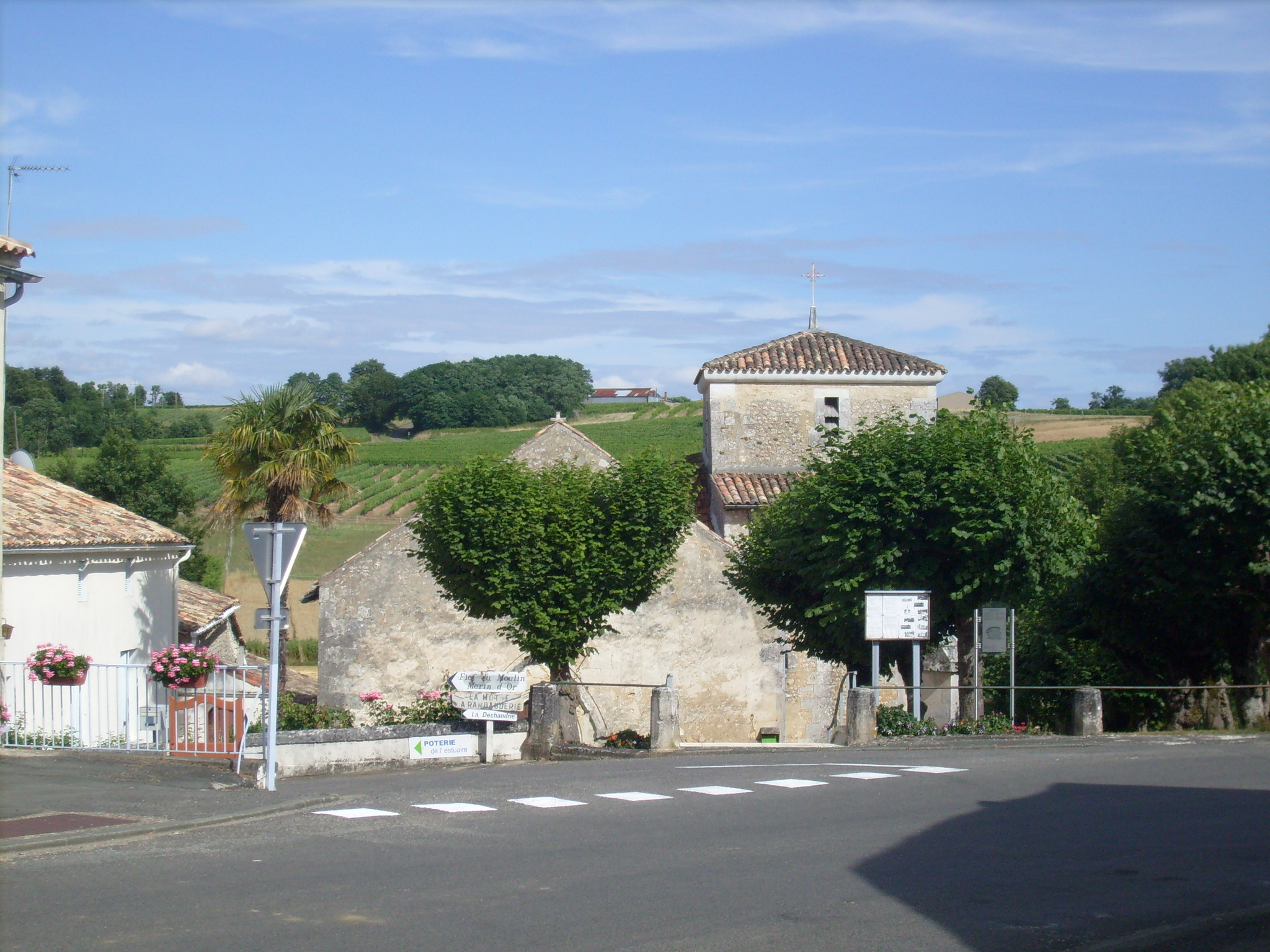 Village de Saint-Sorlin de Cônac